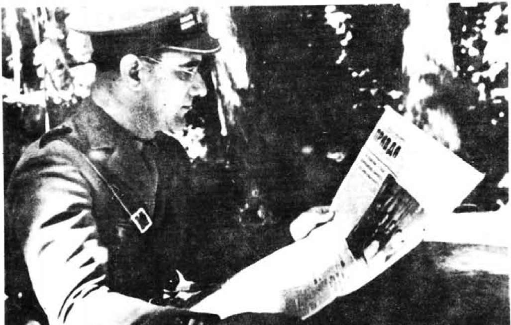 Srpskohrvatski / српскохрватски: Vladimir Ćopić čita Pravdu na frontu u Španiji